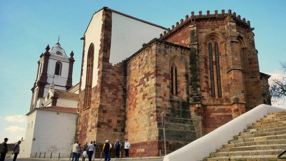 Sé Catedral de Silves - Vista exterior